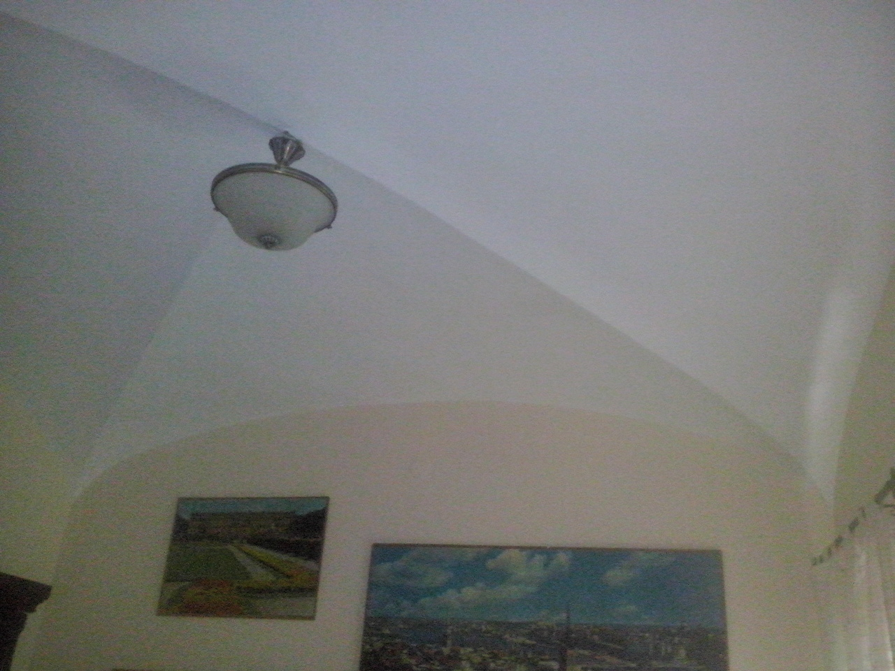 Boveda tabicada extremeña de arista